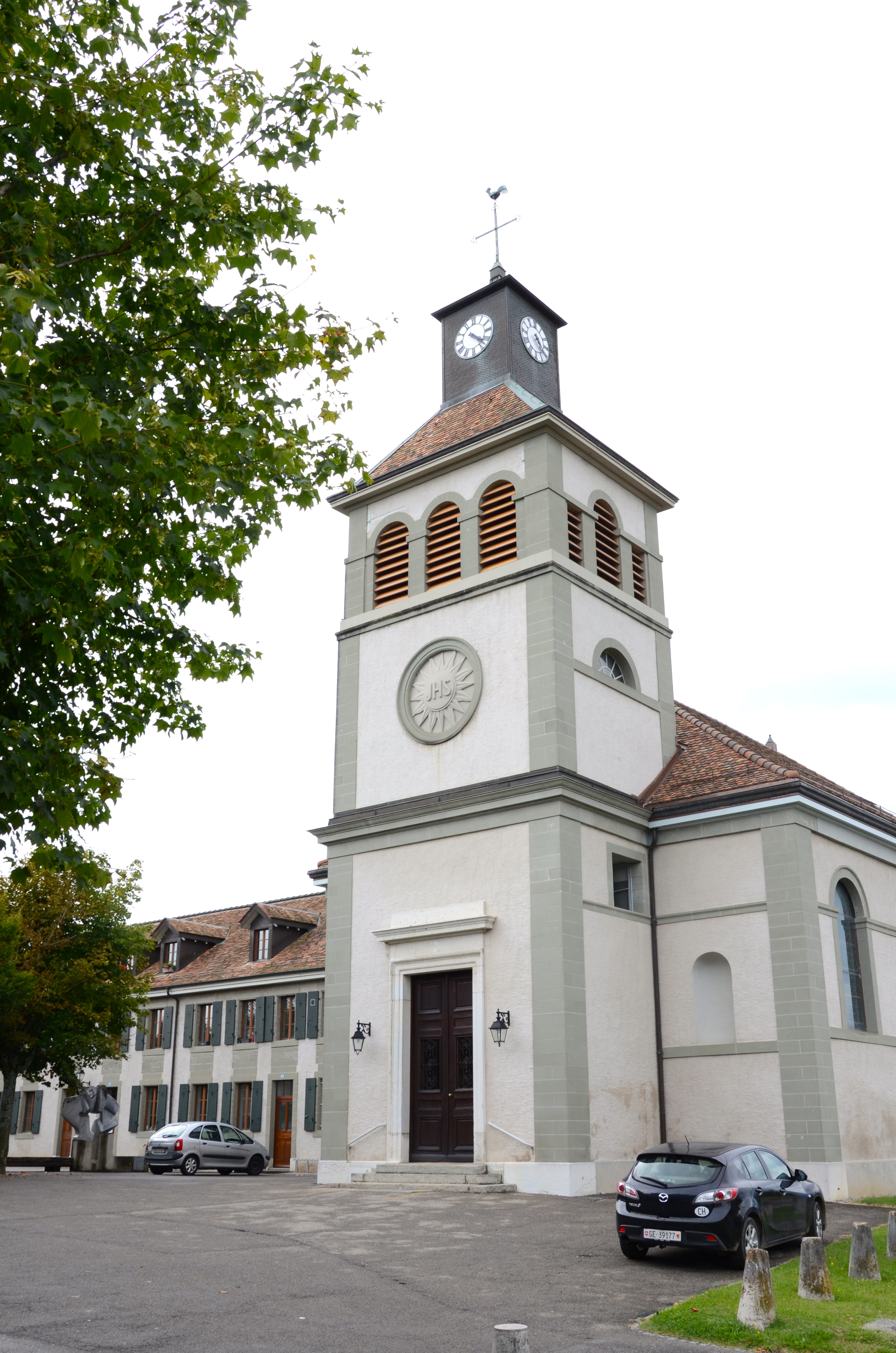 Eglise Saint-Pierre-aux-Liens, Soral, Genève